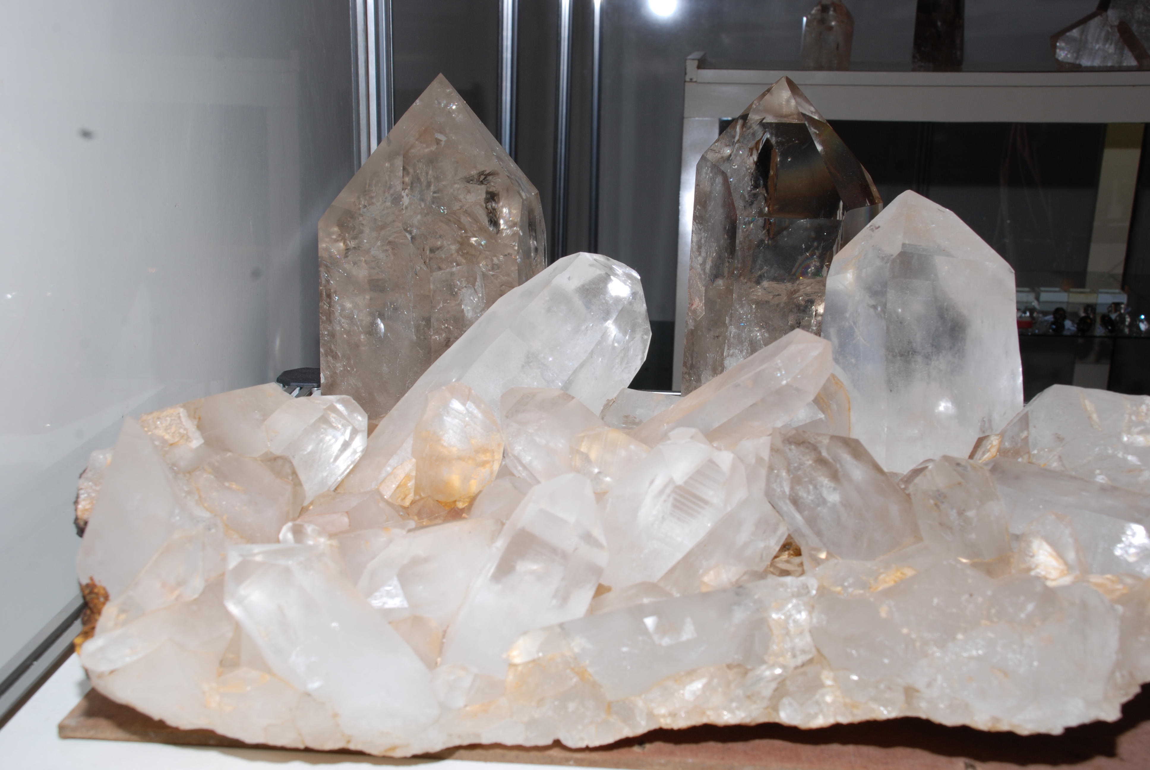 Cristais de Cristalina Goiás, a cidade tem a maior reserve de cristal de rocha do mundo.